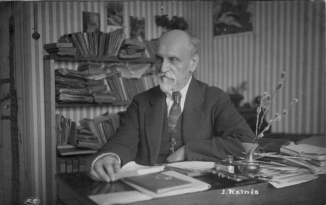 Jānis Rainis, latviešu dzejnieks